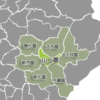 山上區相對位置